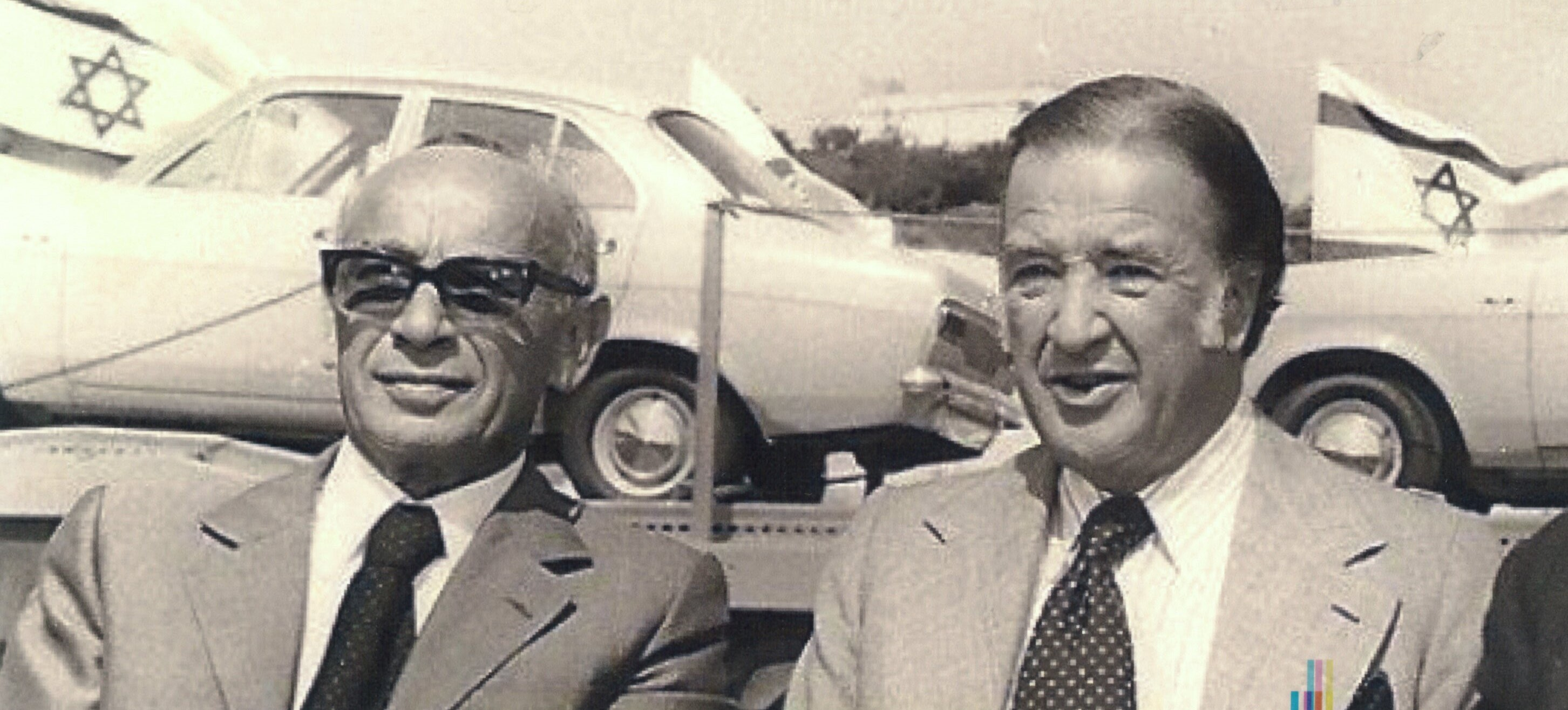 יוסף (ג׳ו) בוקסנבאום